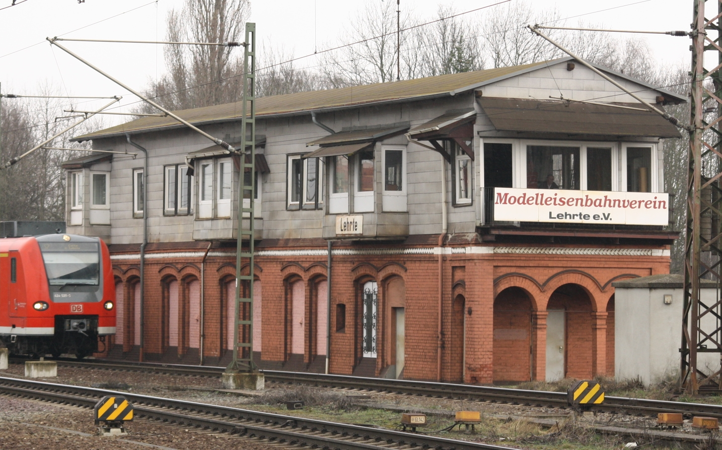 Museumsstellwerk LPF in Lehrte/Region Hannover/Germany